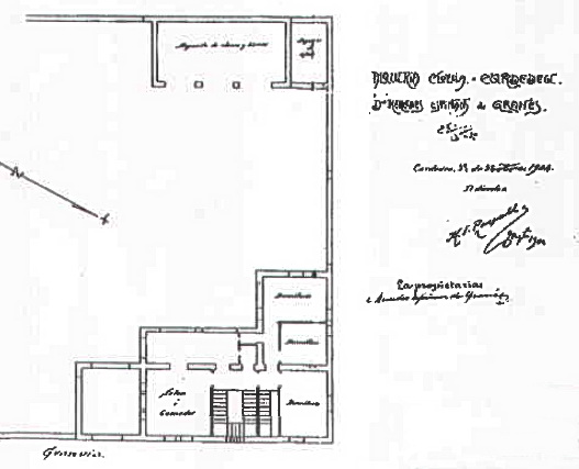 Planta de l'Alqueria Cloelia de Cardedeu (Catalunya), obra de 1904 de Joaquim Raspall